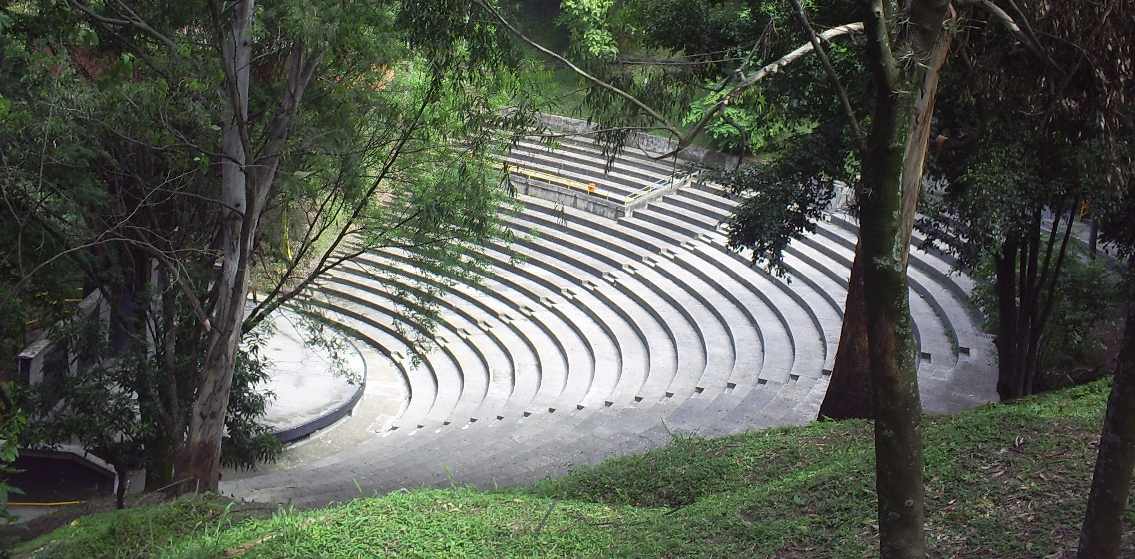 Teatro al Aire Libre “Carlos Vieco, en el Cerro Nutibara. Medellín, Colombia